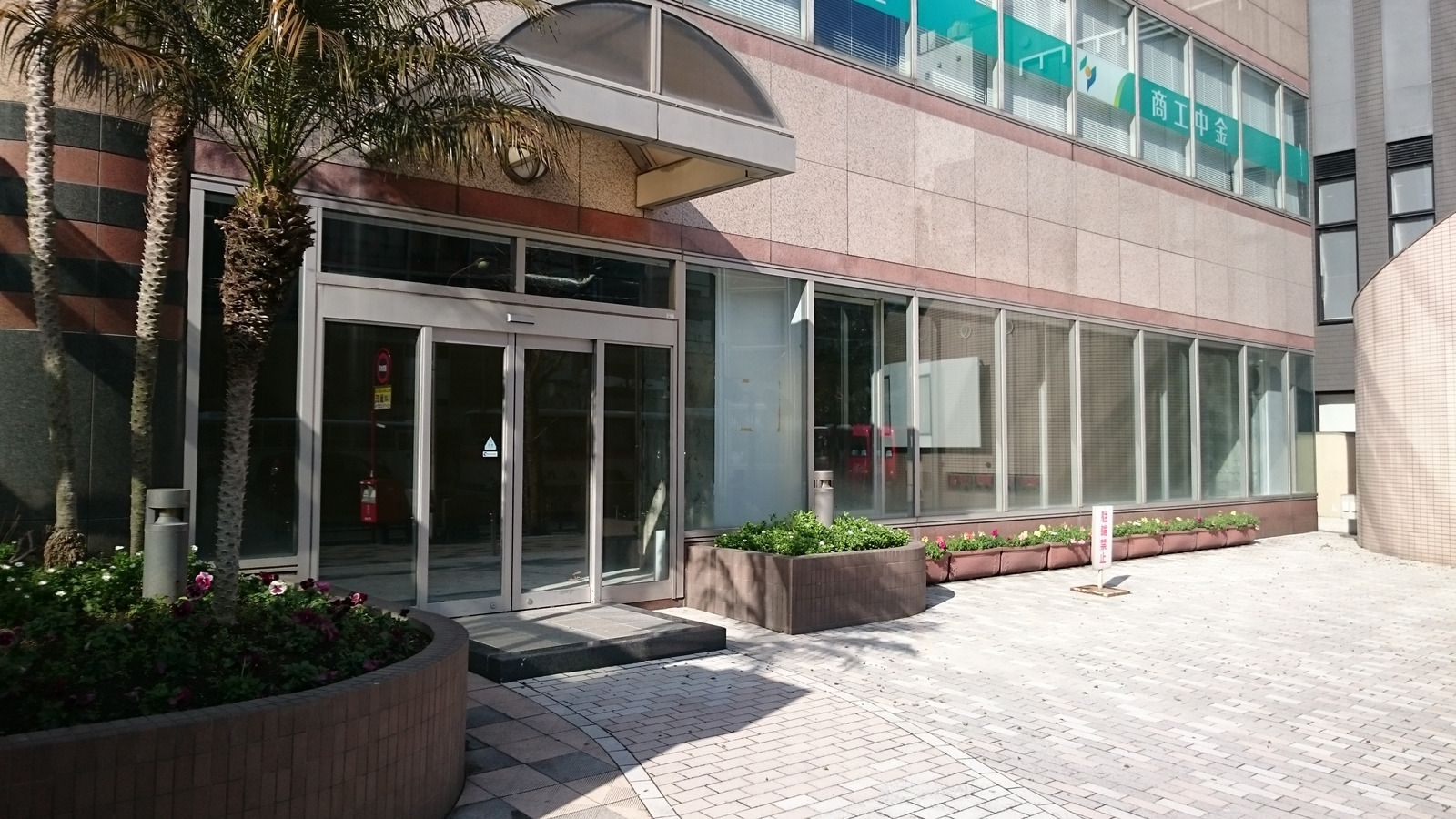 放送開始から2003年1月まで使用していた生放送スタジオ